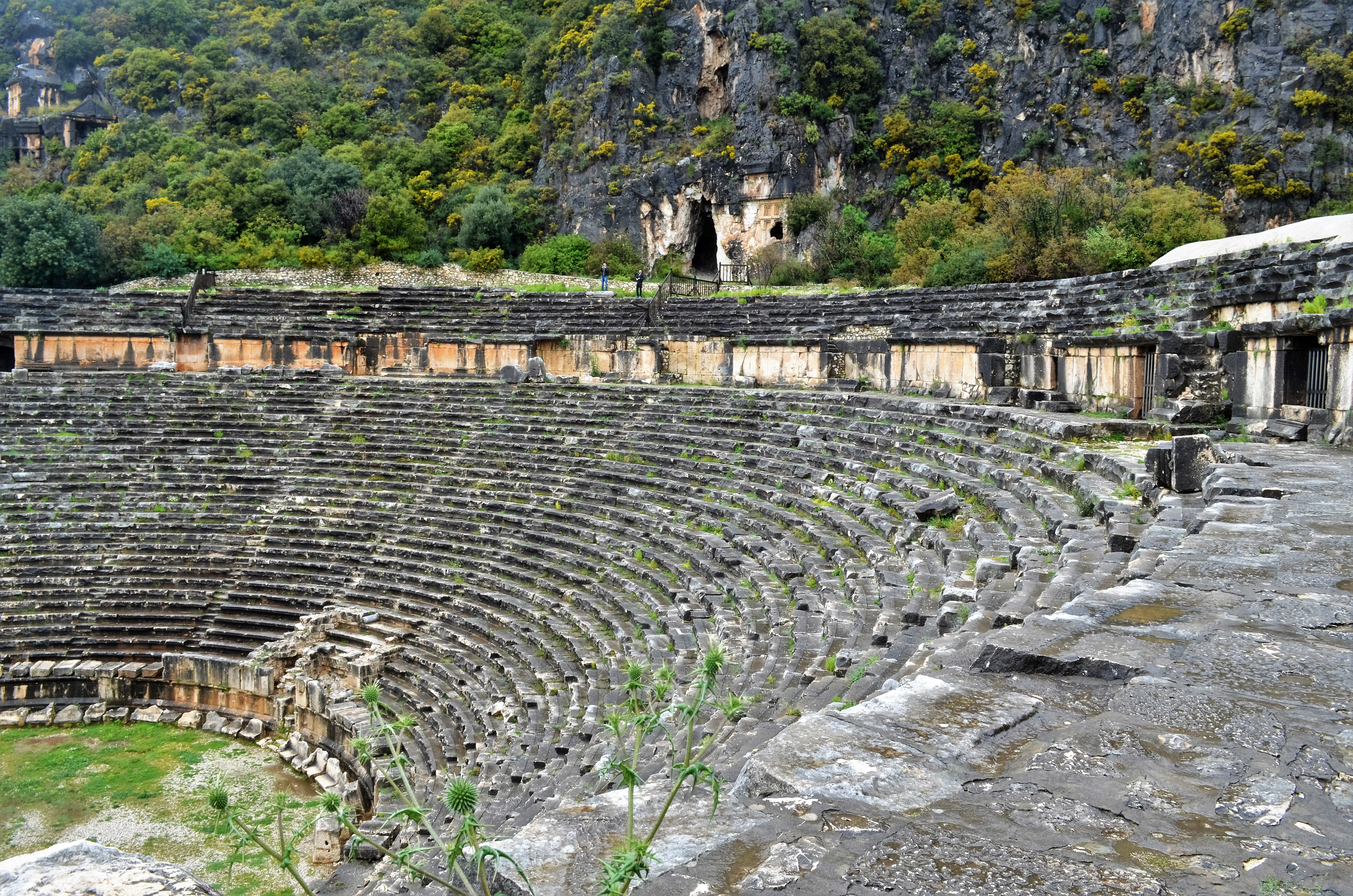 Mira divadlo 2